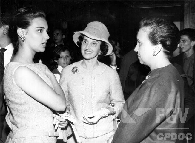 Tancredo Neves e Risoleta Neves recebem cumprimentos por ocasião de embarque para Roma Da esq. para dir.: Inês Maria Neves (1ª); Risoleta Neves (2ª); Amélia Gomes de Resende Passos (3ª). Agência Nacional.